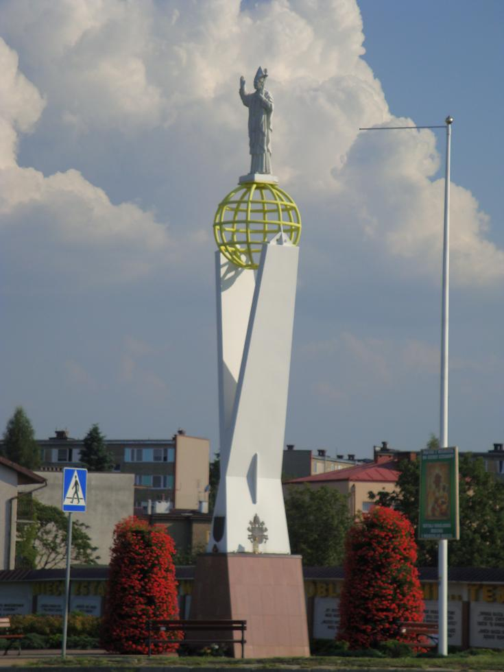 Pomnik Papieża Jana Pawła II w Tarnobrzegu